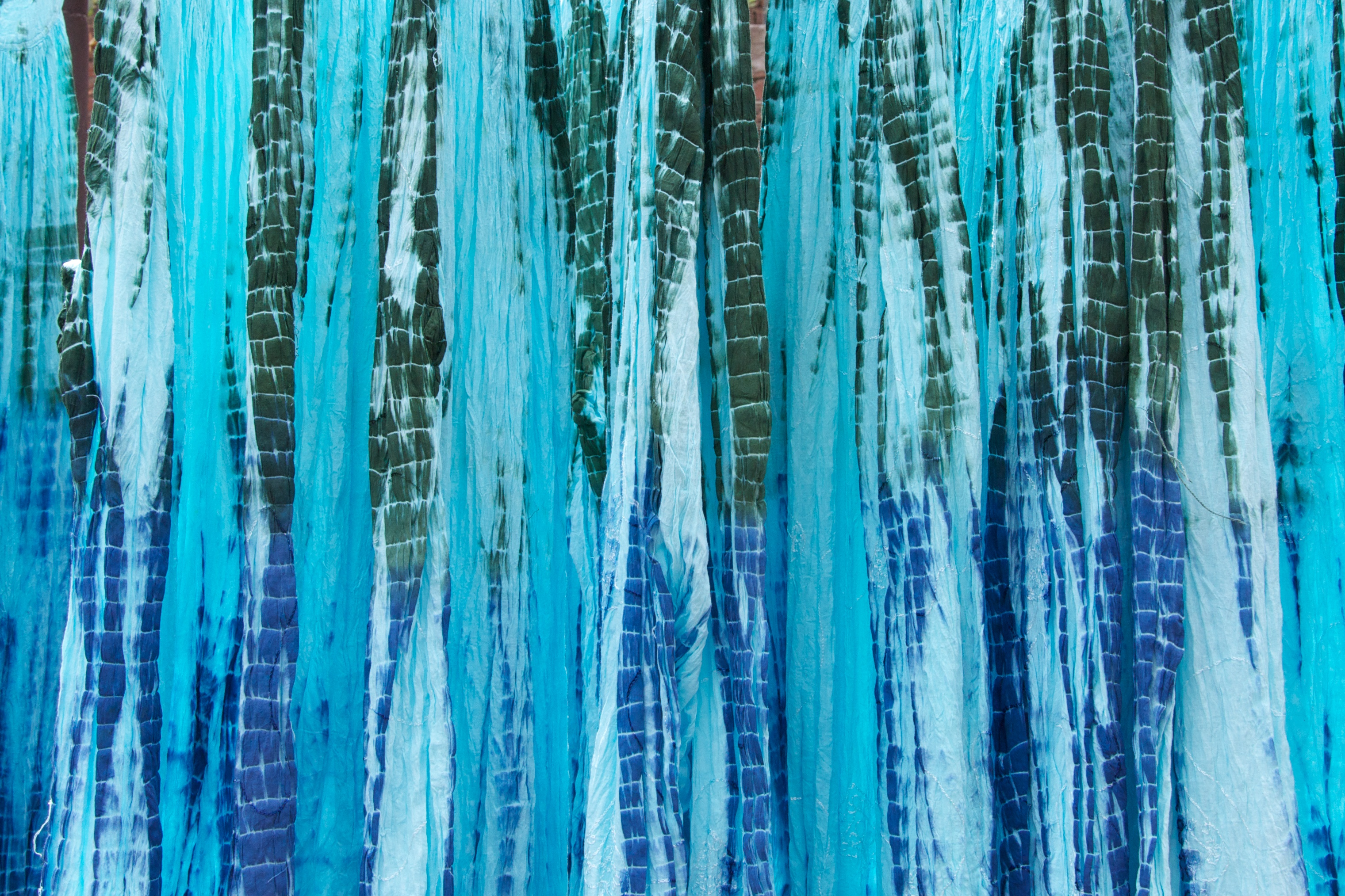 Tie dye dresses drying